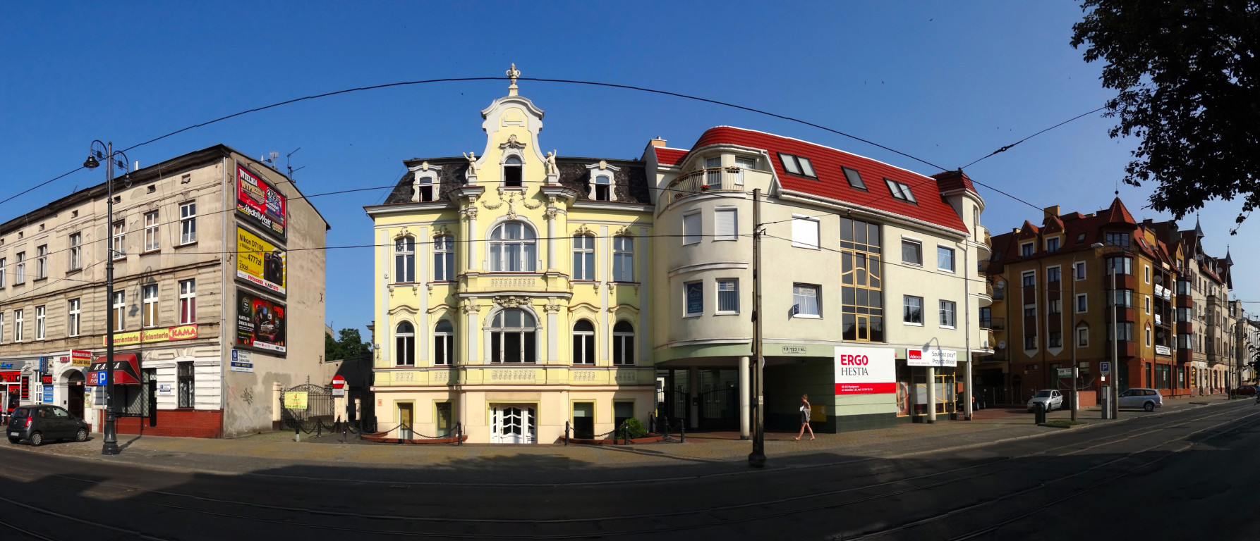 Ulica Gdańska w Bydgoszczy